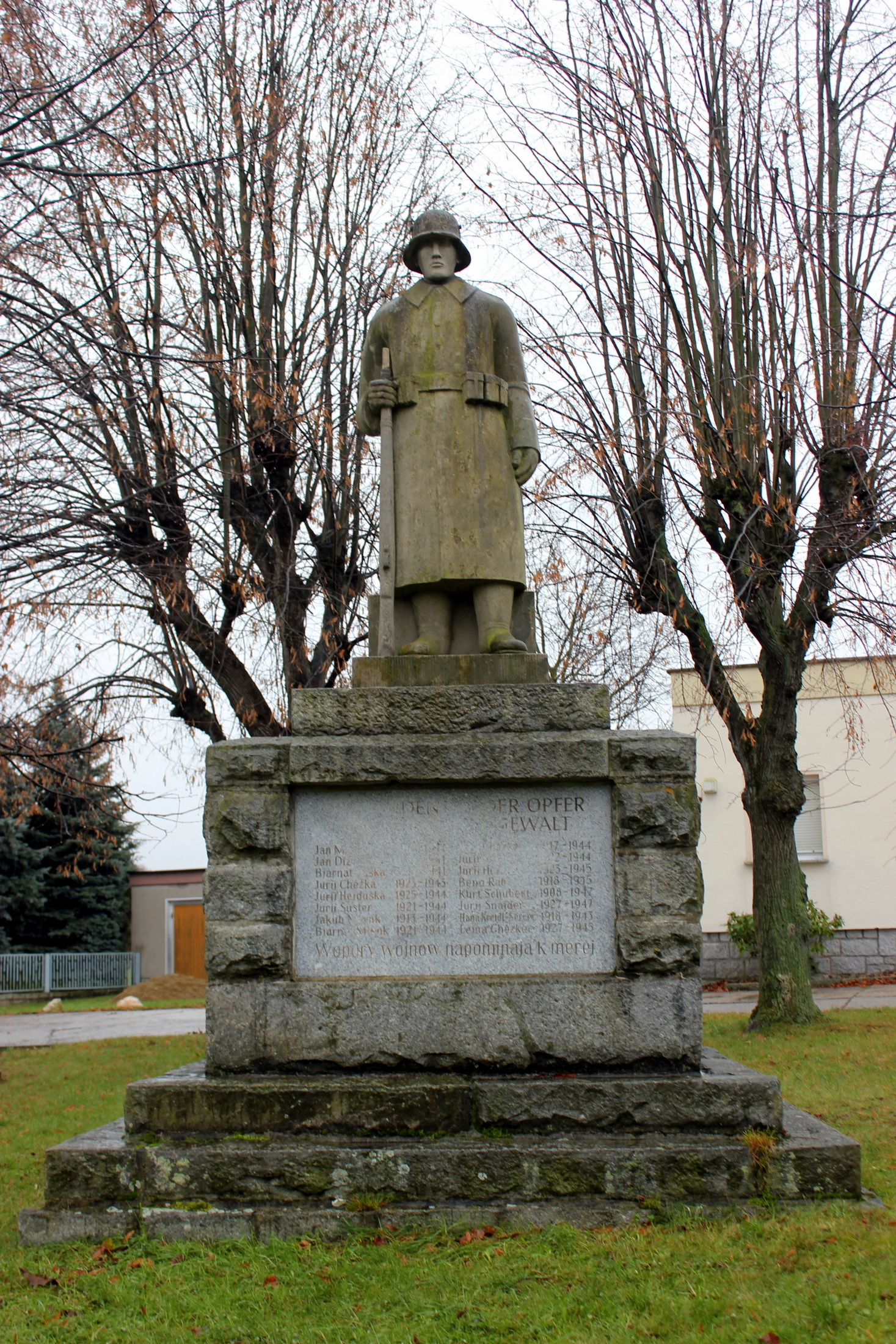 Hornjoserbsce: Hórki; wojerski pomnik.